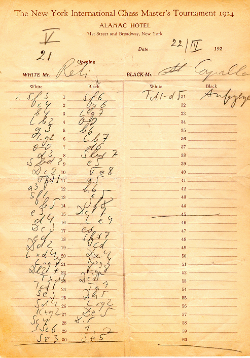 Capablanca and Réti's score sheet (uma planilha de notação de Capablanca e Réti).